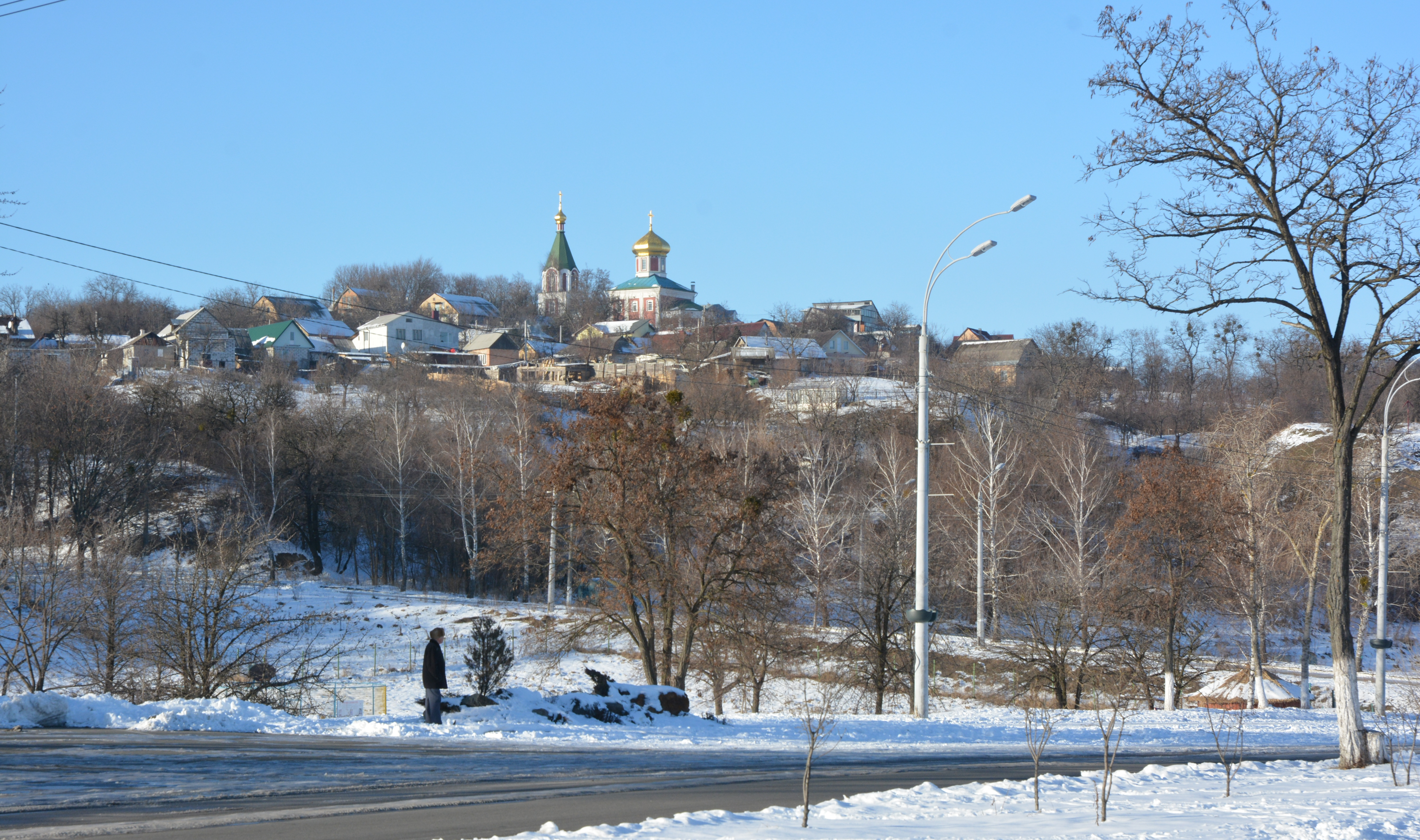 Історичний ландшафт давньоруського м. Вишгорода, Вишгород, у межах Вишгородської гори, від підніжжя схилів Київського плато на півдні до північної межі останця